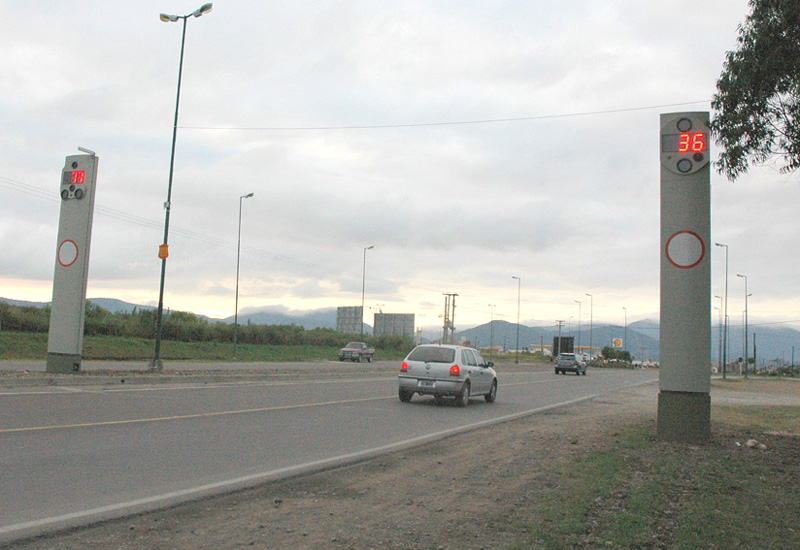 Carretera/ruta en la Provincia de Salta, Argentina